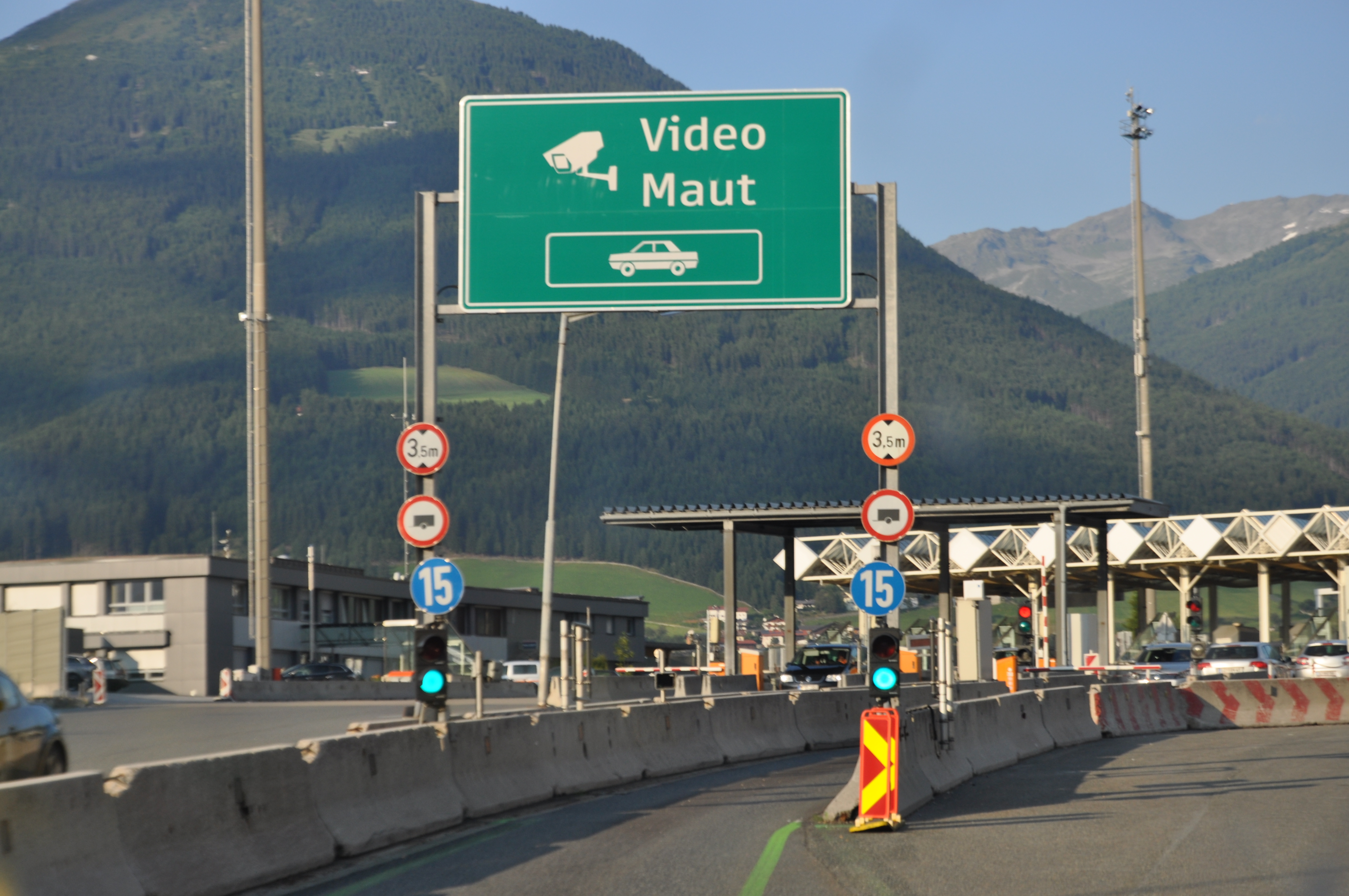 Videomaut, Mautstelle Schönberg Richtung Brenner/Brennero